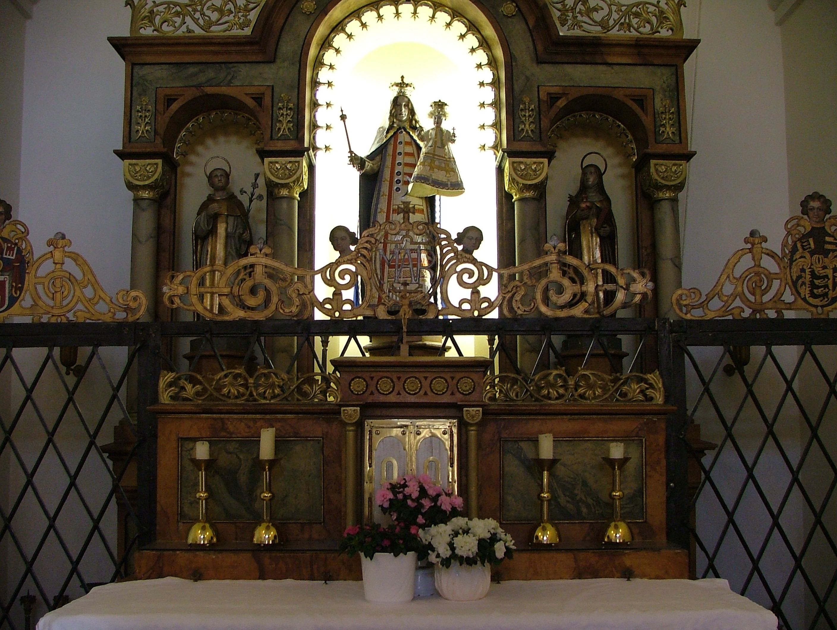 Altar